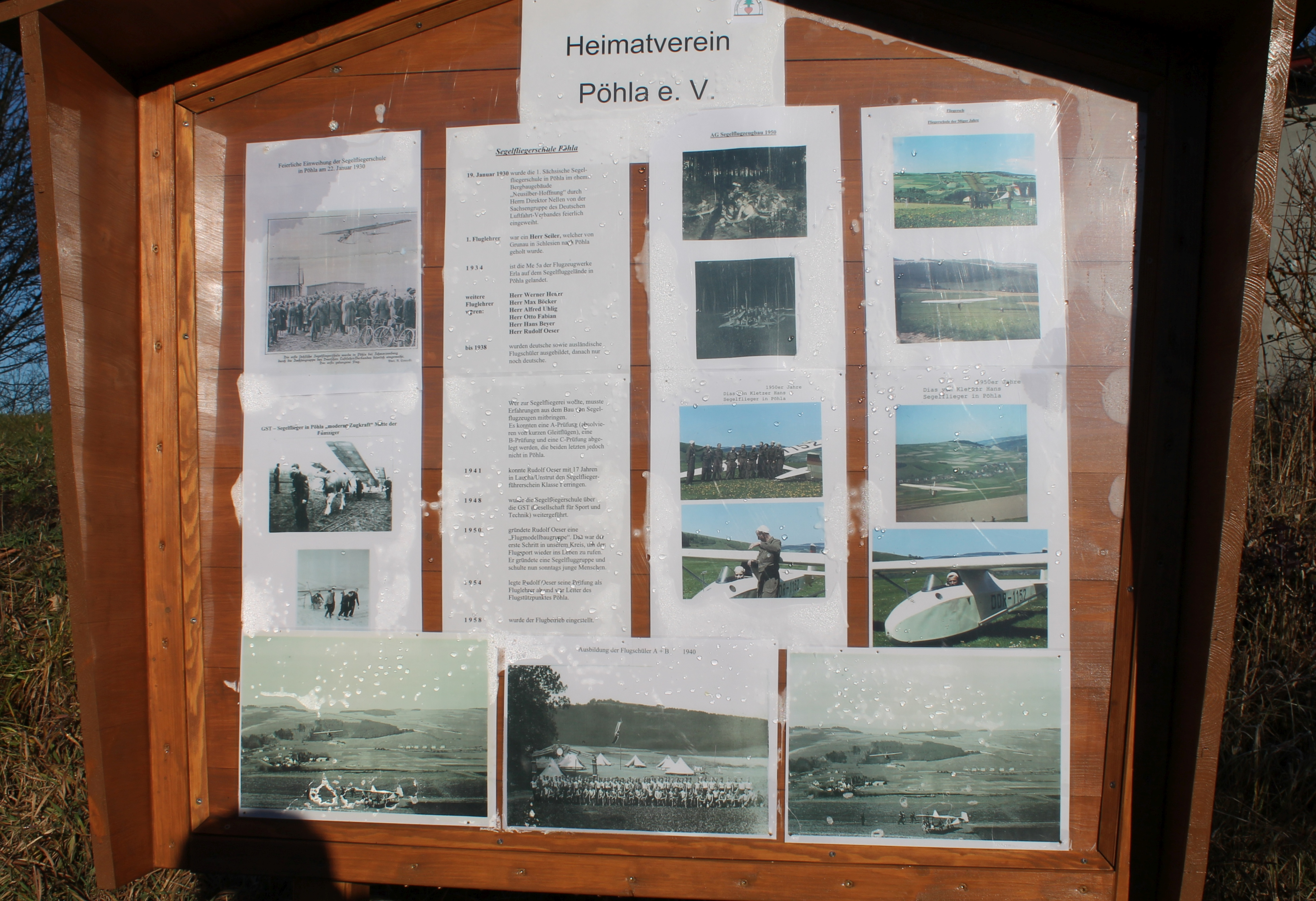 Schautafel des Heimatvereins Pöhla zur sächsischen Segelflieferschule auf dem Gelände der Neu-Silberhoffnung Fundgrube. Pöhla, Sachsen, Deutschland.